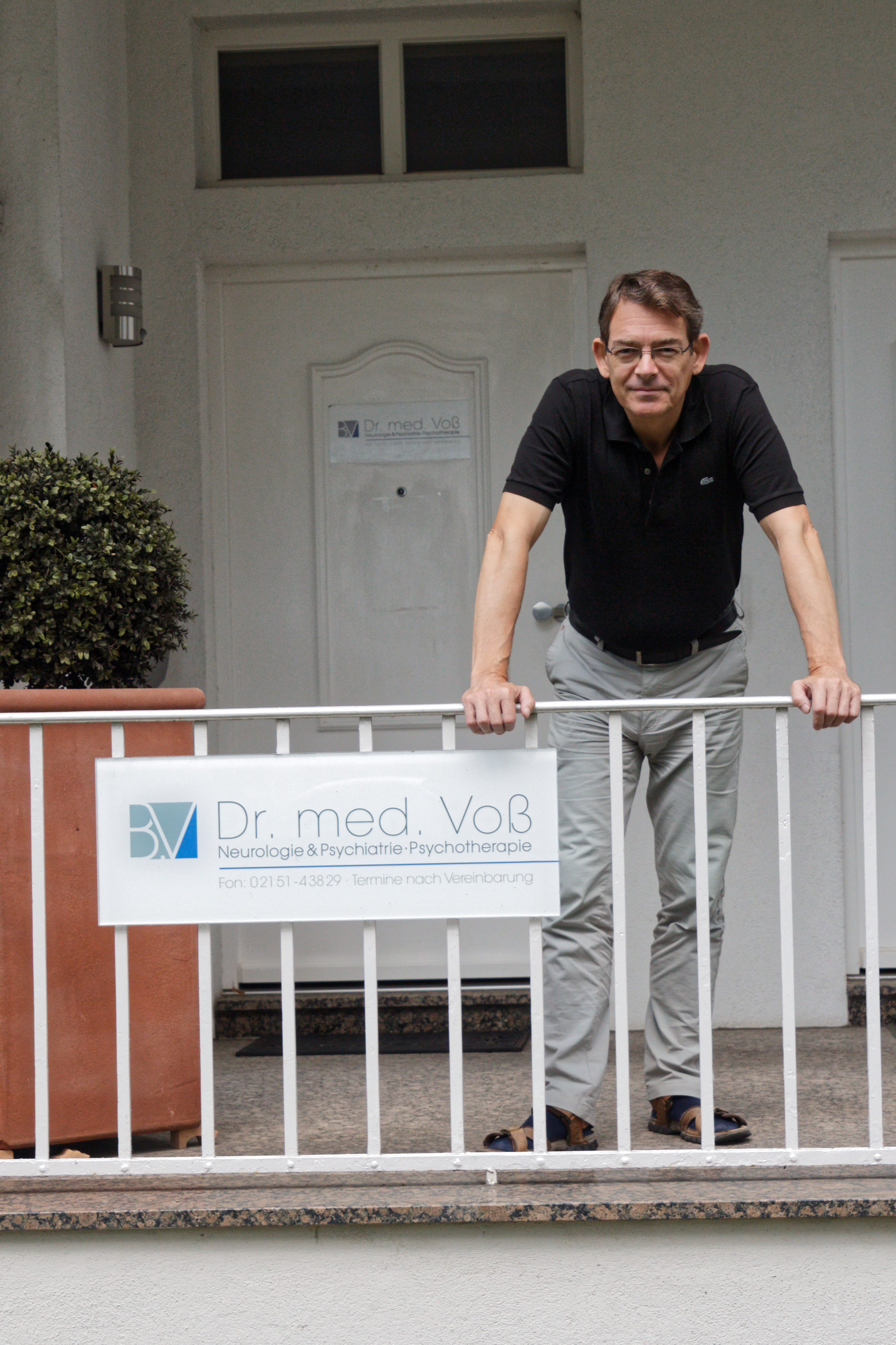 Dr. Burkhard Voss, Neurologe, Psychiater, Psychotherapeut (Krefeld)